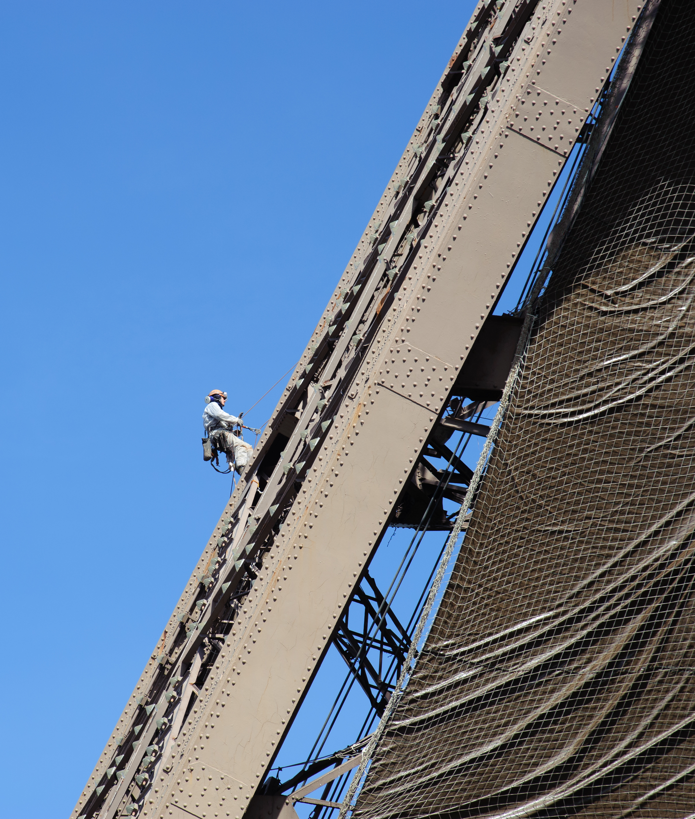 Wartungsarbeiten am Eiffelturm